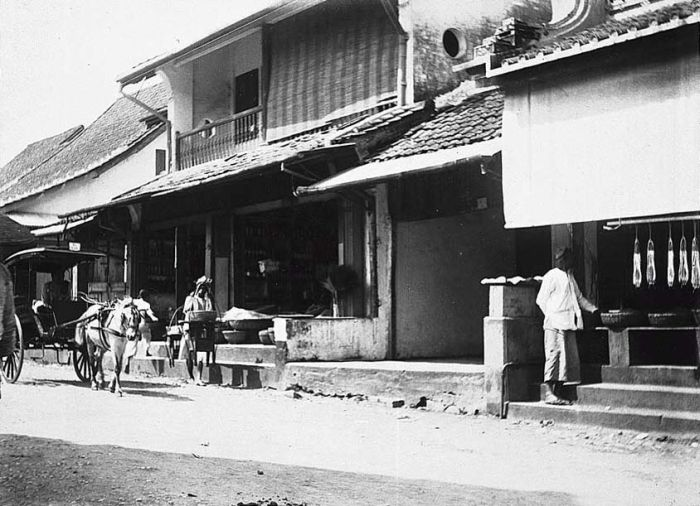 Foto. Buitenzorg, winkelstraat in de Chinese wijk